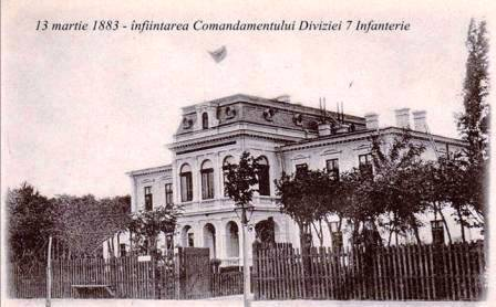 Comandamentului Diviziei 7 Infanterie din Roman, România